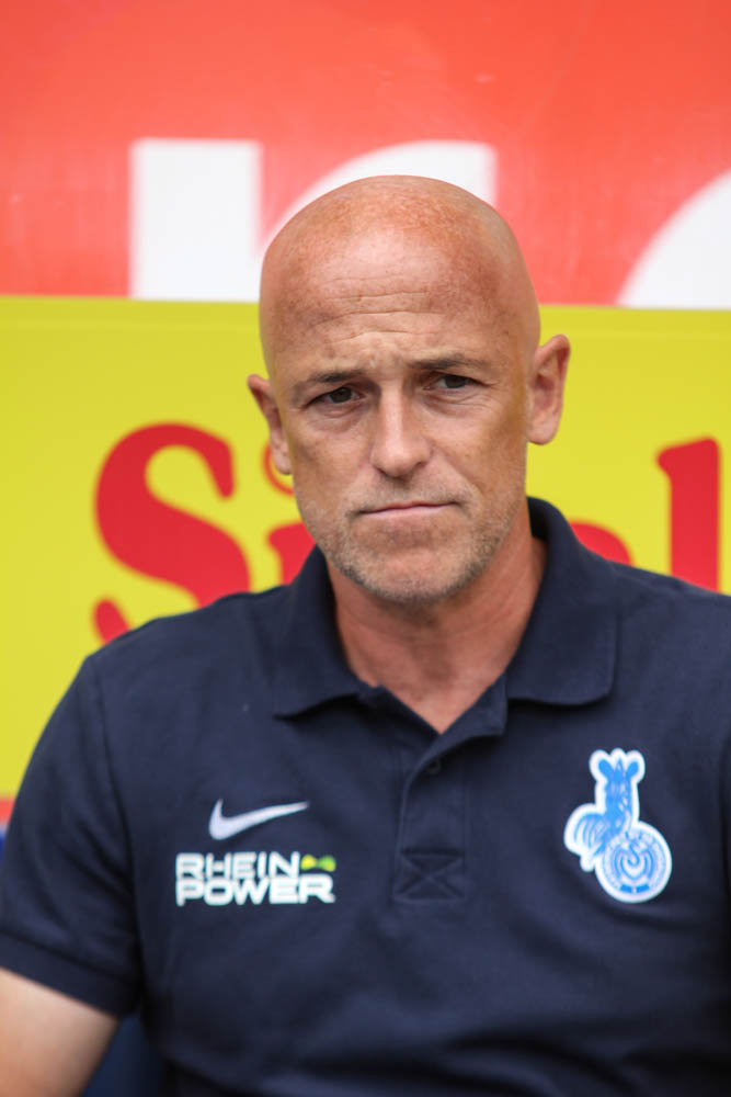 German football manager Karsten Baumann, MSV Duisburg